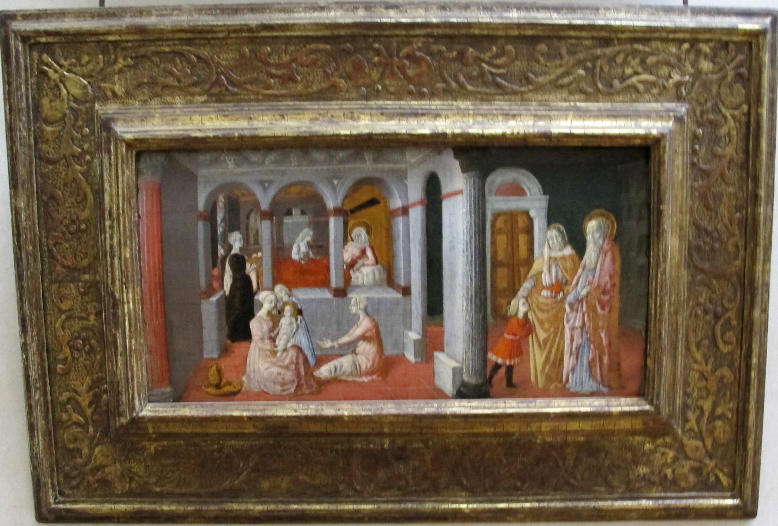 Pittura del Quattrocento italiano, Louvre